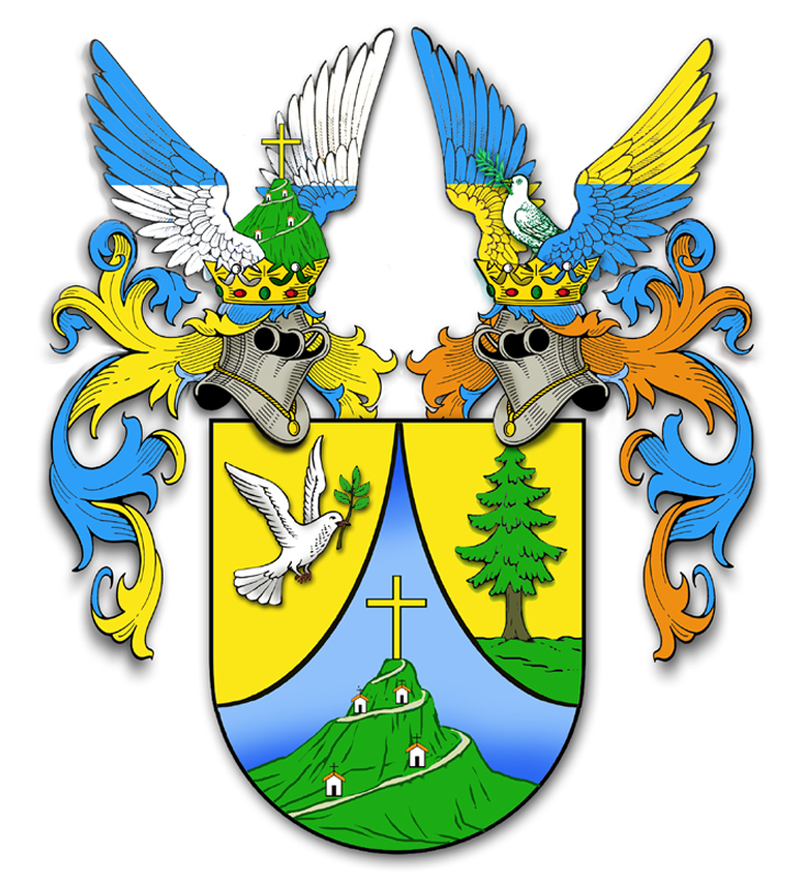 Brasão da família Sartori di Montecroce, de Primiero e Innsbruck